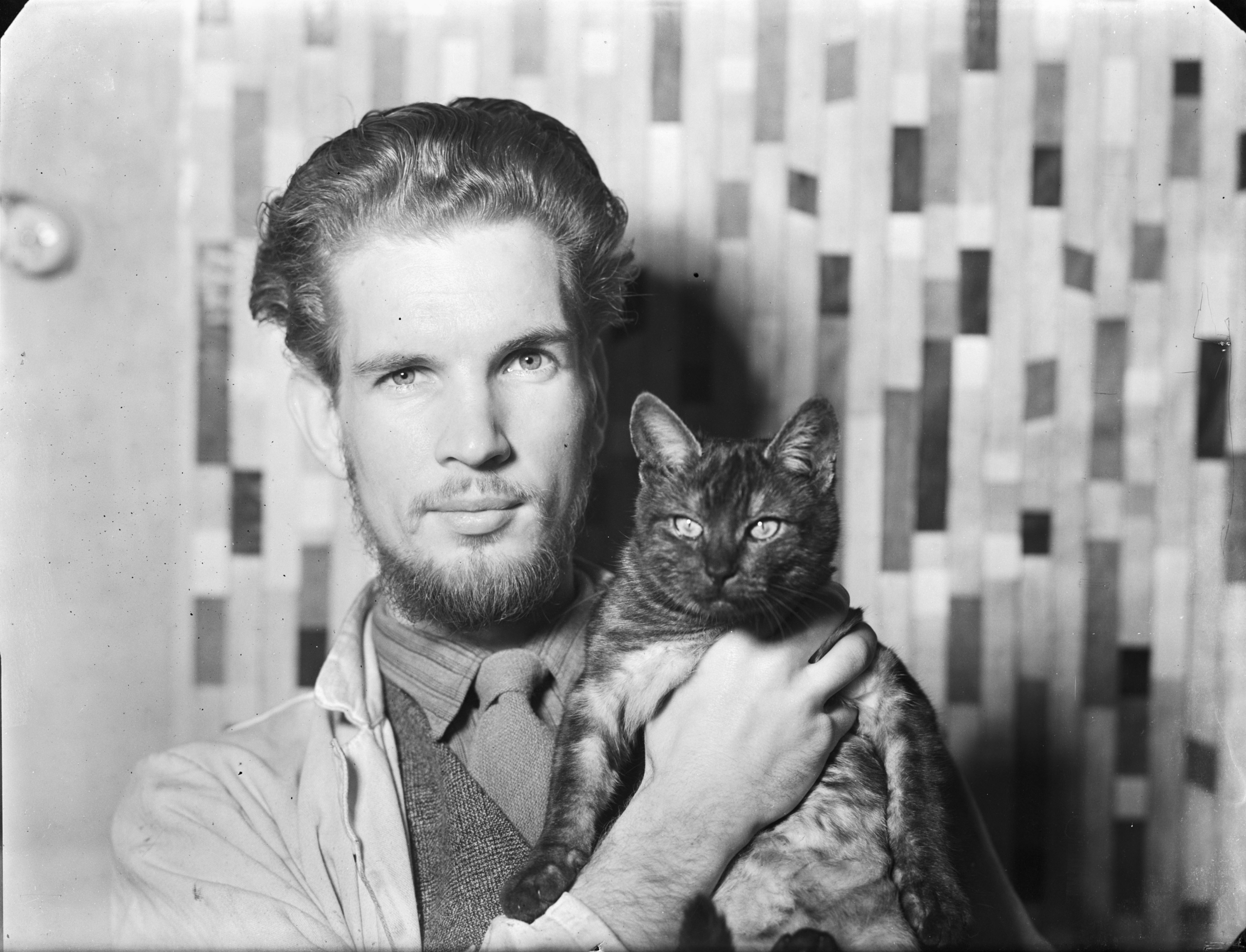 Porträtt av konstnären Olle Bonniér med katt.